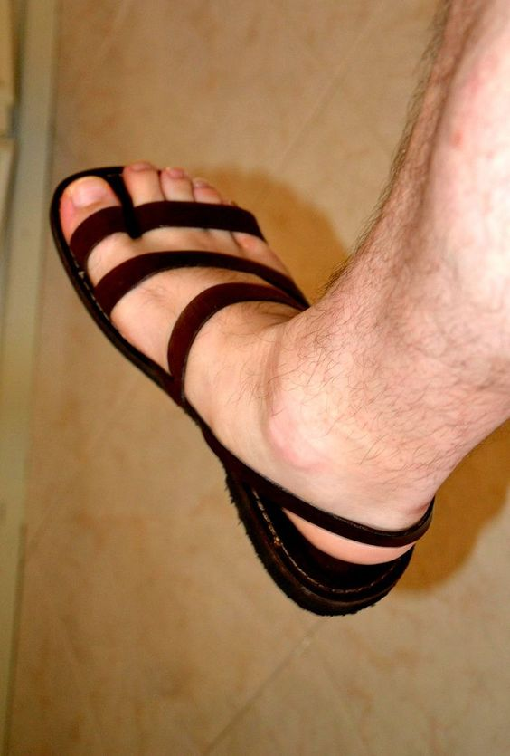 Sandali salentini